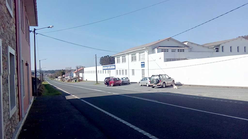 Vista de Vilallonte, Sedes.